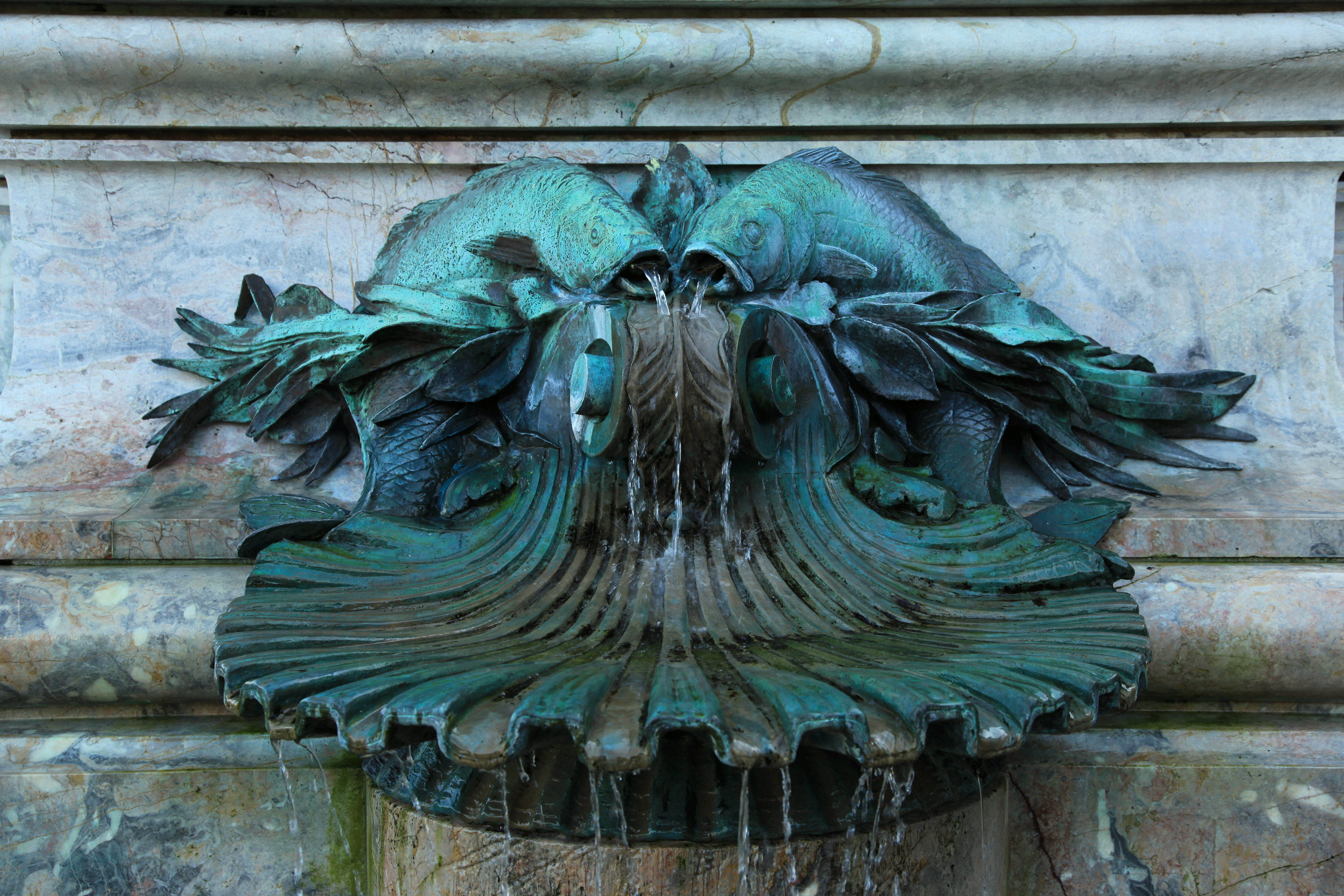 Vater Rhein und seine Töchter an der Ständehausstraße in Düsseldorf